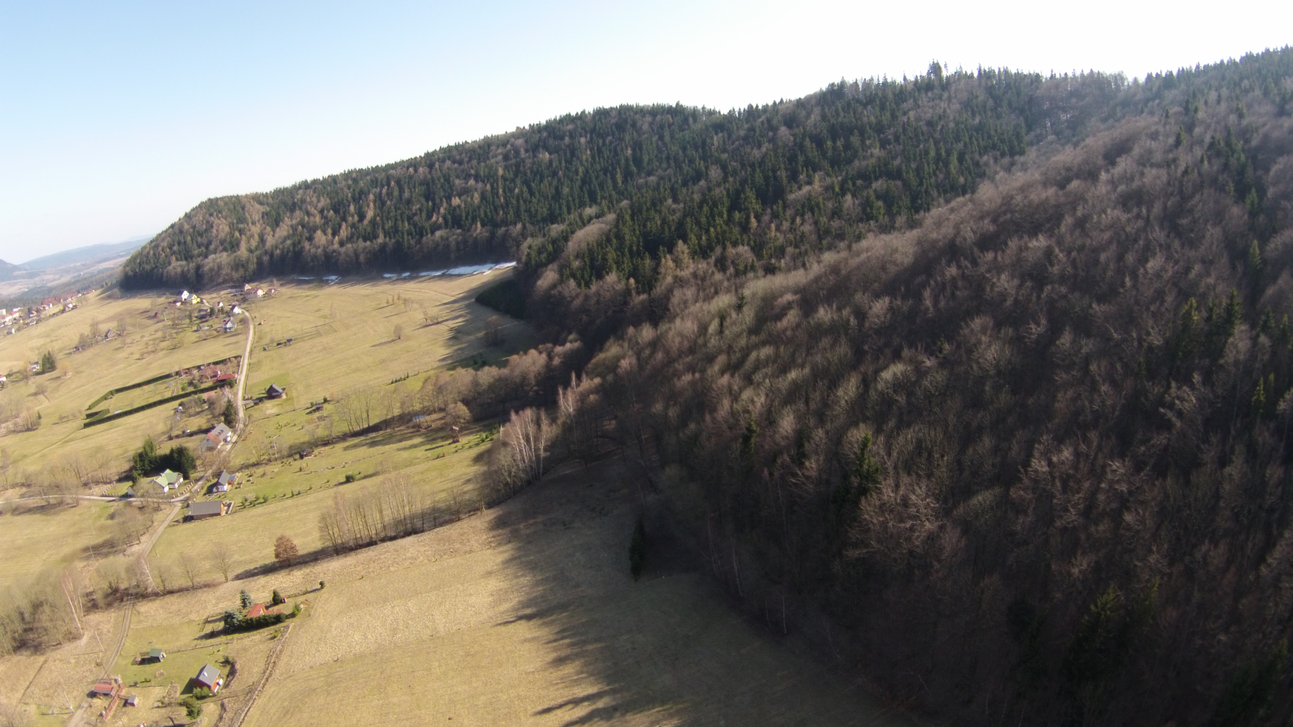 Boberská stráň ze vzduchu